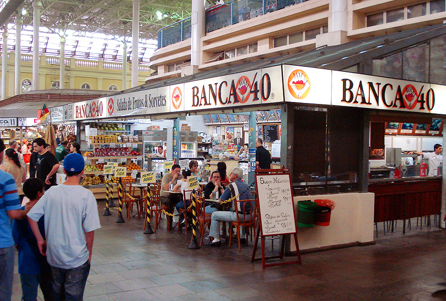 Interior do Mercado Público de Porto Alegre, Brasil, mostrando a tradicional Banca 40.